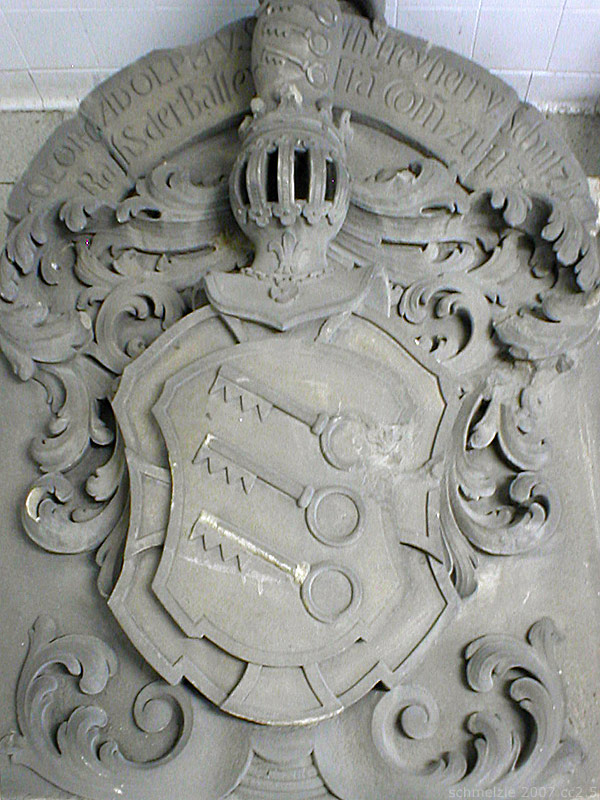 Wappen des Deutschordenskomturen Georg Adolph Speth von Schülzburg vom ehem. Sommerhaus des Deutschordens in (Heilbronn-)Sontheim. Kopie um 1900 vom originalen Wappenstein im Lapidarium Heilbronn. Im Sommerhaus befand sich später die Zwirnerei Ackermann, die das Wappen mit den drei Wolfsfallen (irrtümlich als Schlüssel gedeutet) zu ihrem Firmenlogo machte.